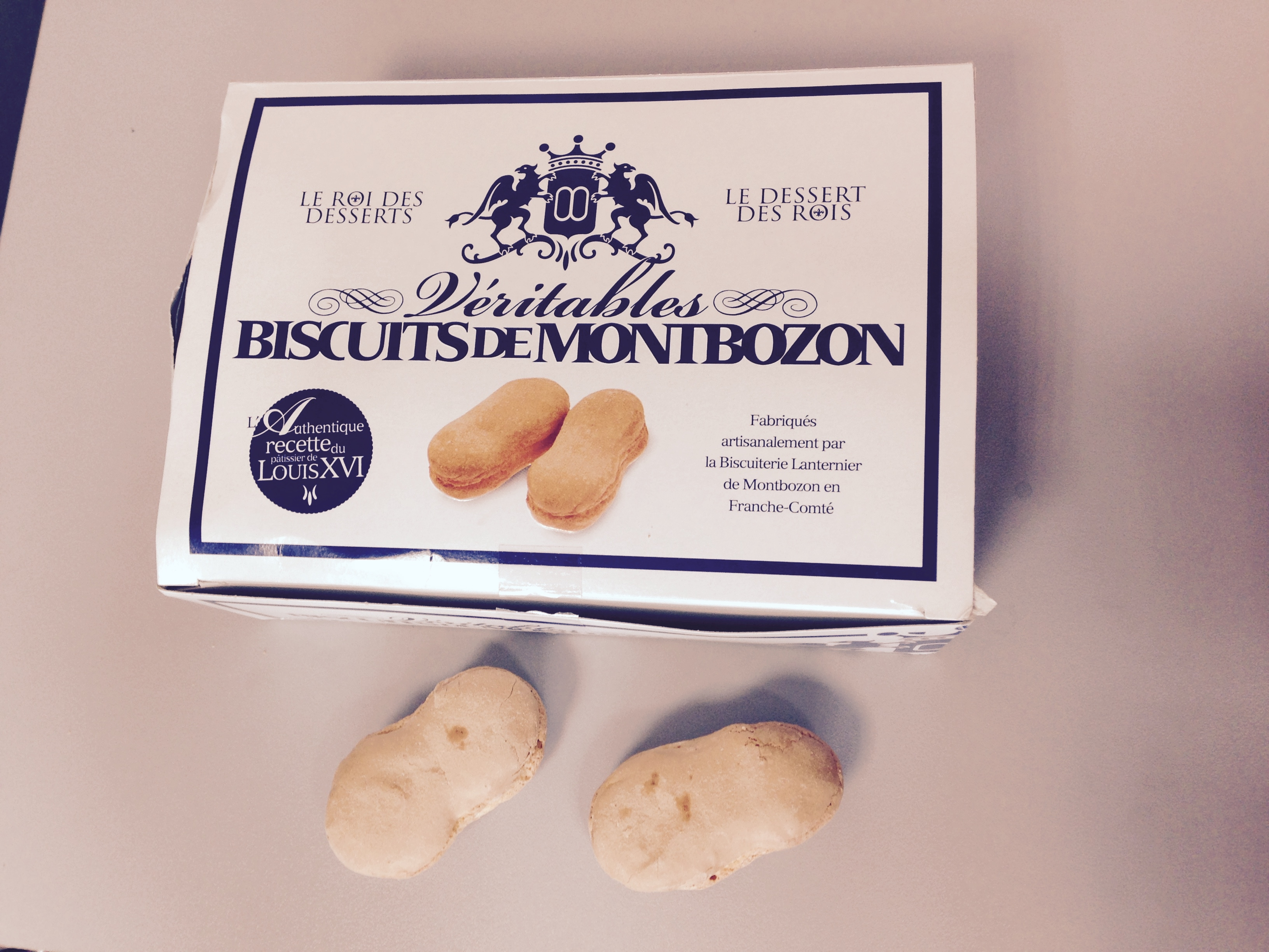 Deux biscuits de Montbozon devant leur boîte de la biscuiterie Lanternier de Montbozon.